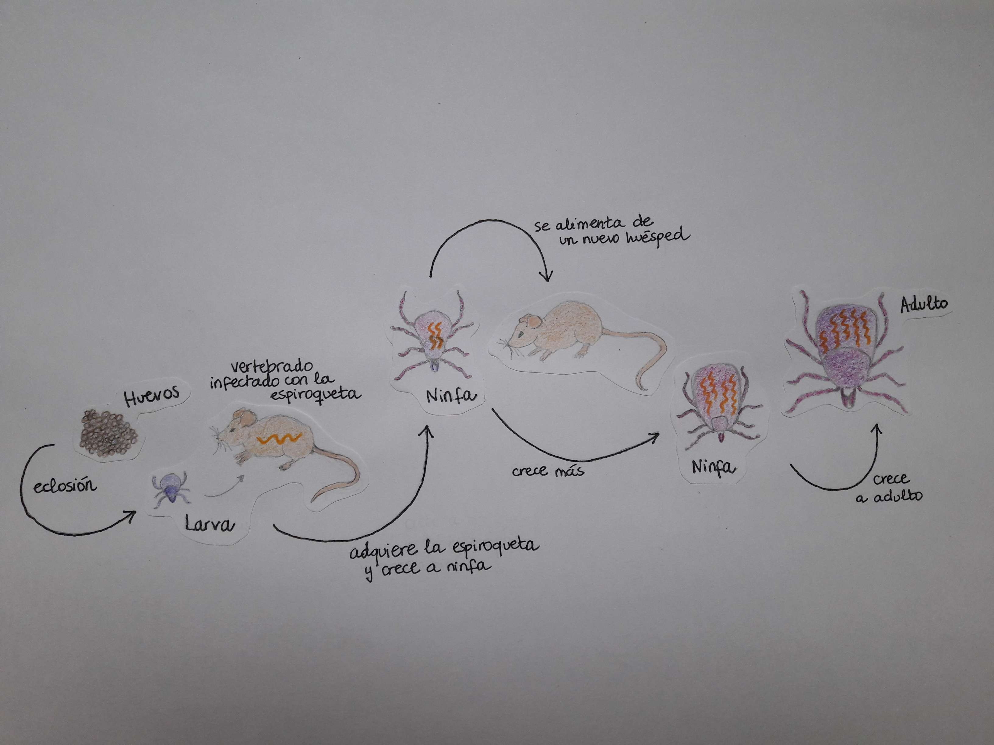 La eclosión de los huevos de garrapata da lugar a larvas de garrapata. Éstas se alimentan del reservorio animal que contiene la espiroqueta en su organismo. Así adquieren también la espiroqueta y mudan al estadio de ninfa. Una vez convertidas en ninfa y portando la espiroqueta, se alimentan de nuevos huéspedes que no portan la espiroqueta en su organismo todavía. Así consiguen crecer más y llegar al estadio final de adulto. El paso que completa el ciclo es la deposición de huevos por la hembra adulto; estos huevos no han adquirido la espiroqueta de la madre.